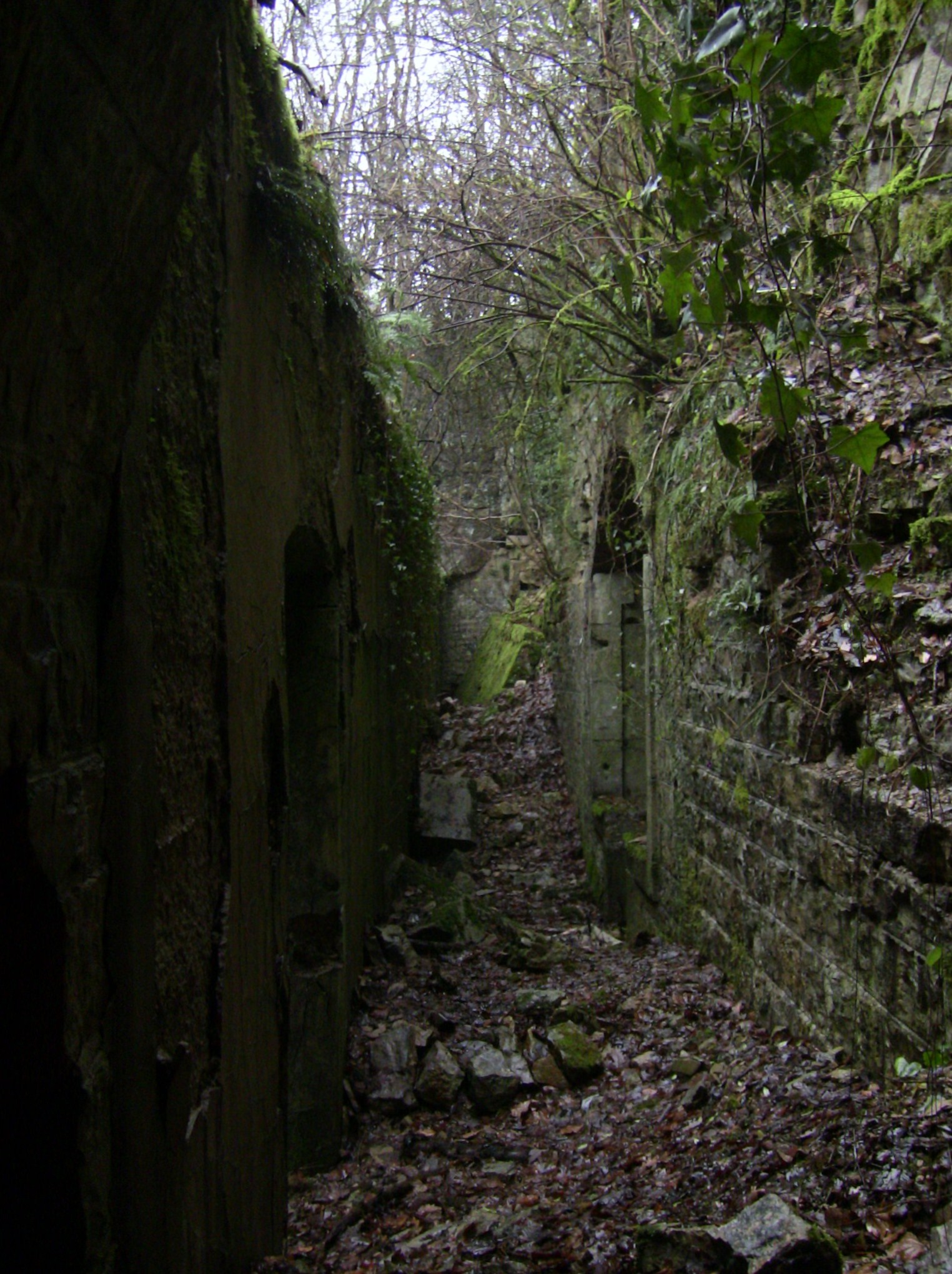 Façades de l'abris caverne de la carrière du fort de Planoise, à Besançon (Doubs, France).